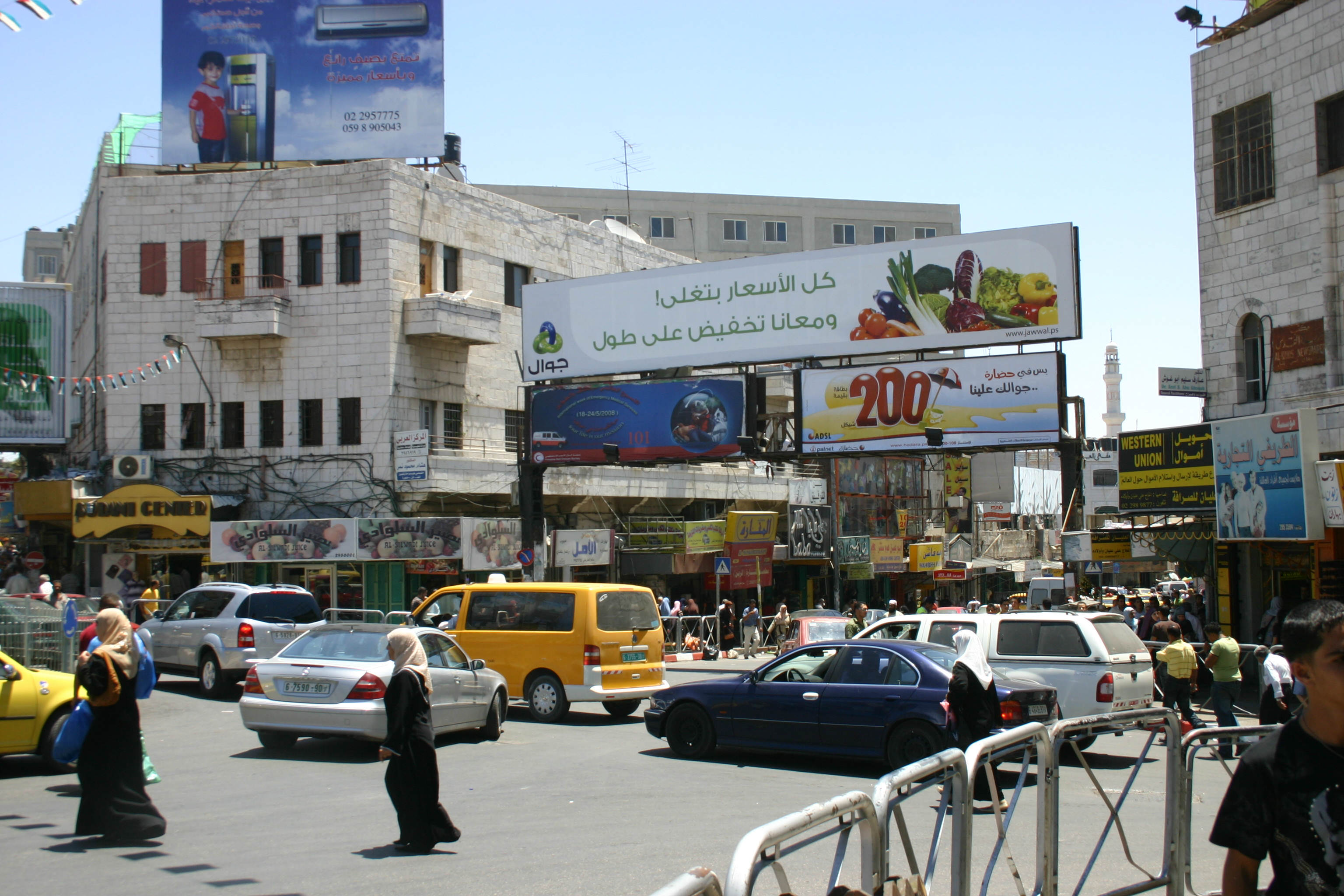 Al-Bireh Manarah Square